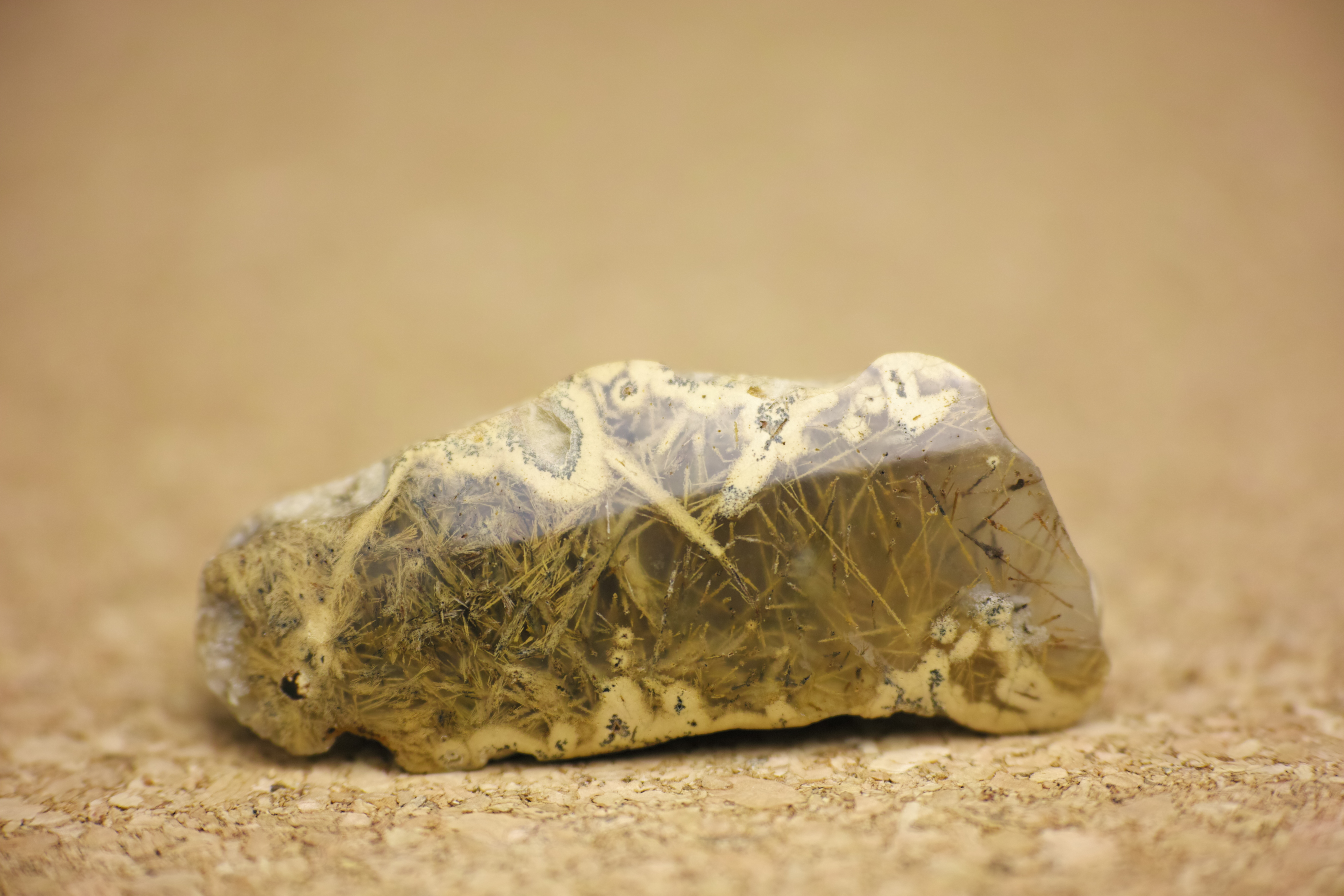 Beach Agate with Sagenite from Central Oregon Coast, near Newport and Yachats, Oregon, U.S.A.